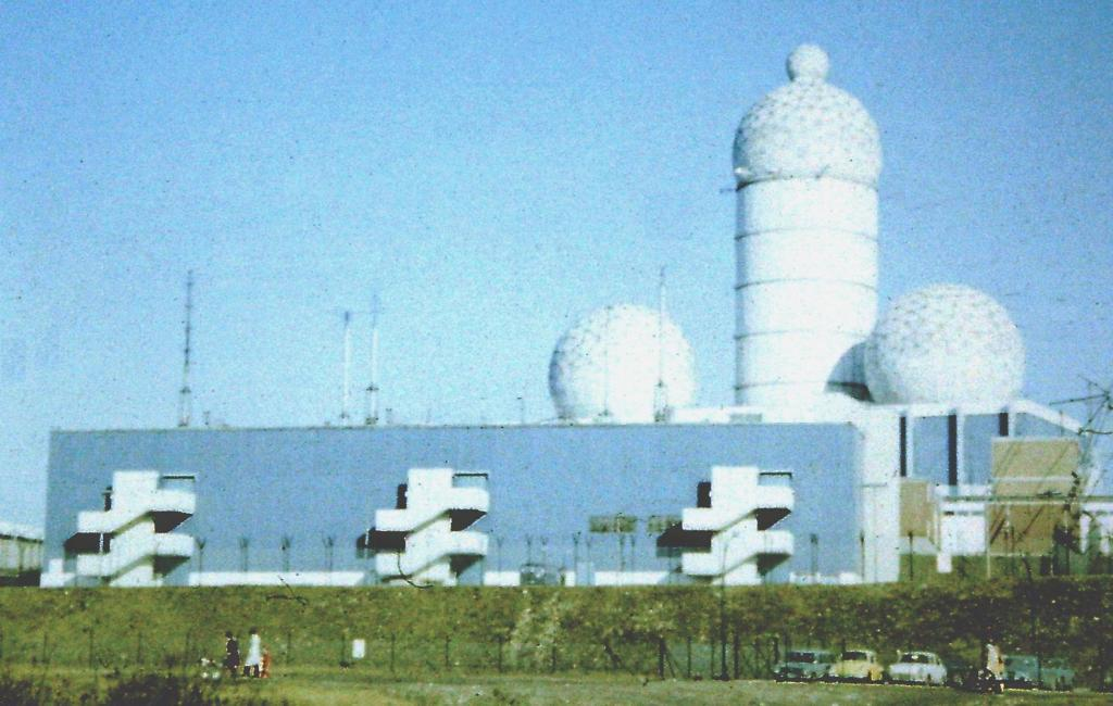 Blick auf die Radaranlage